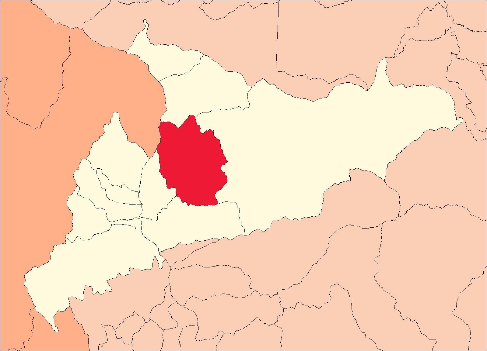 Área del distrito de Tantamayo.